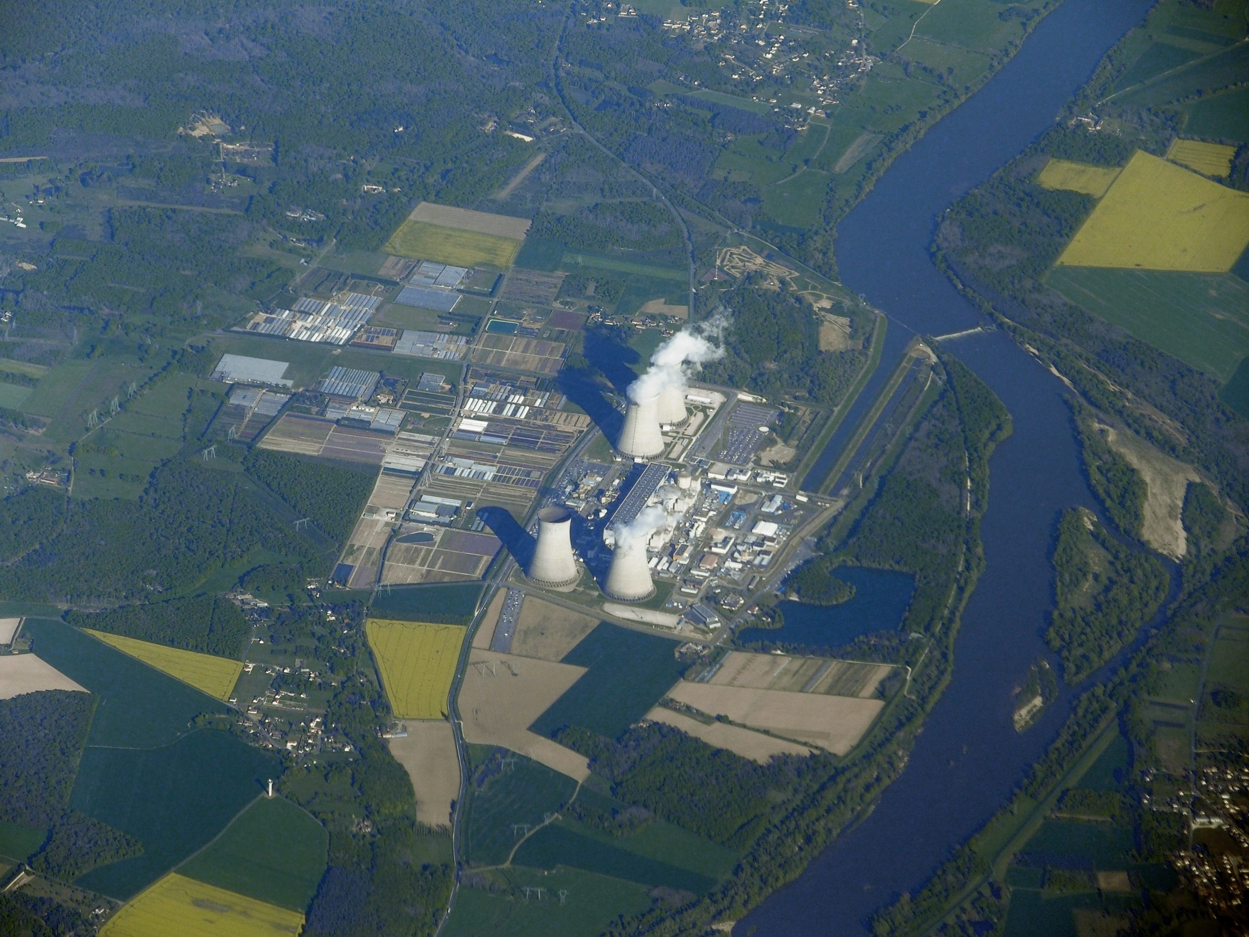 Vue aérienne de la centrale nucleaire de Dampierre